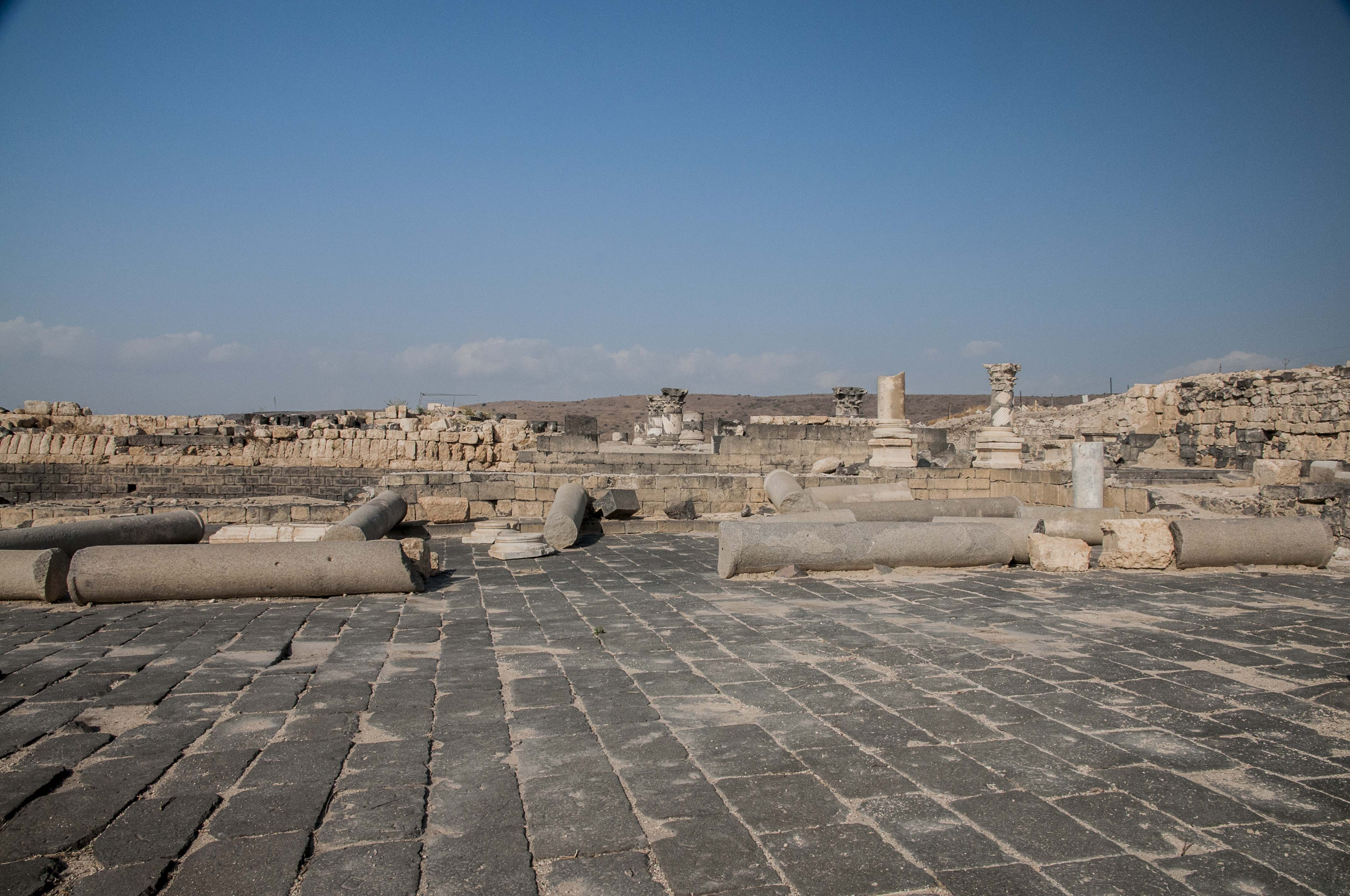 סוסיתא נוסדה כעיר מדינה (פוליס) ככל הנראה באמצע המאה ה-2 לפנה"ס בידי הממלכה הסלאוקית.